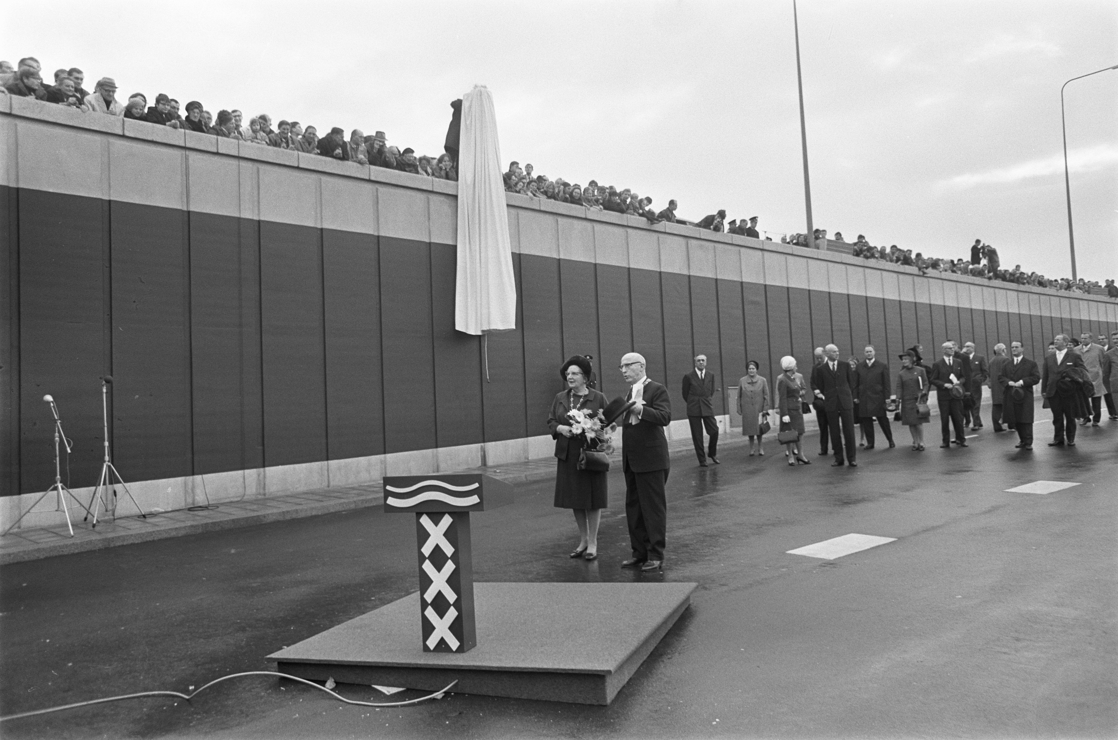 Collectie / Archief : Fotocollectie Anefo Reportage / Serie : [ onbekend ] Beschrijving : Opening IJ tunnel door koningin Juliana Datum : 30 oktober 1968 Trefwoorden : Openingen, koninginnen, tunnels Persoonsnaam : Hare Majesteit de Koningin, Juliana (koningin Nederland), Samkalden, Ivo Fotograaf : Nijs, Jac. de / Anefo Auteursrechthebbende : Nationaal Archief Materiaalsoort : Negatief (zwart/wit) Nummer archiefinventaris : bekijk toegang 2.24.01.05 Bestanddeelnummer : 921-8119